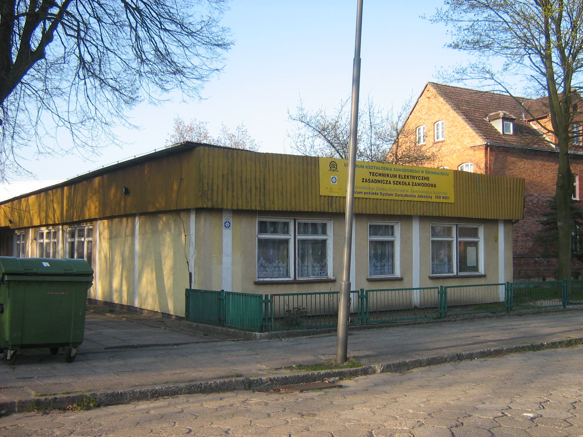 Zasadnicza Szkoła Zawodowa w Świnoujściu.